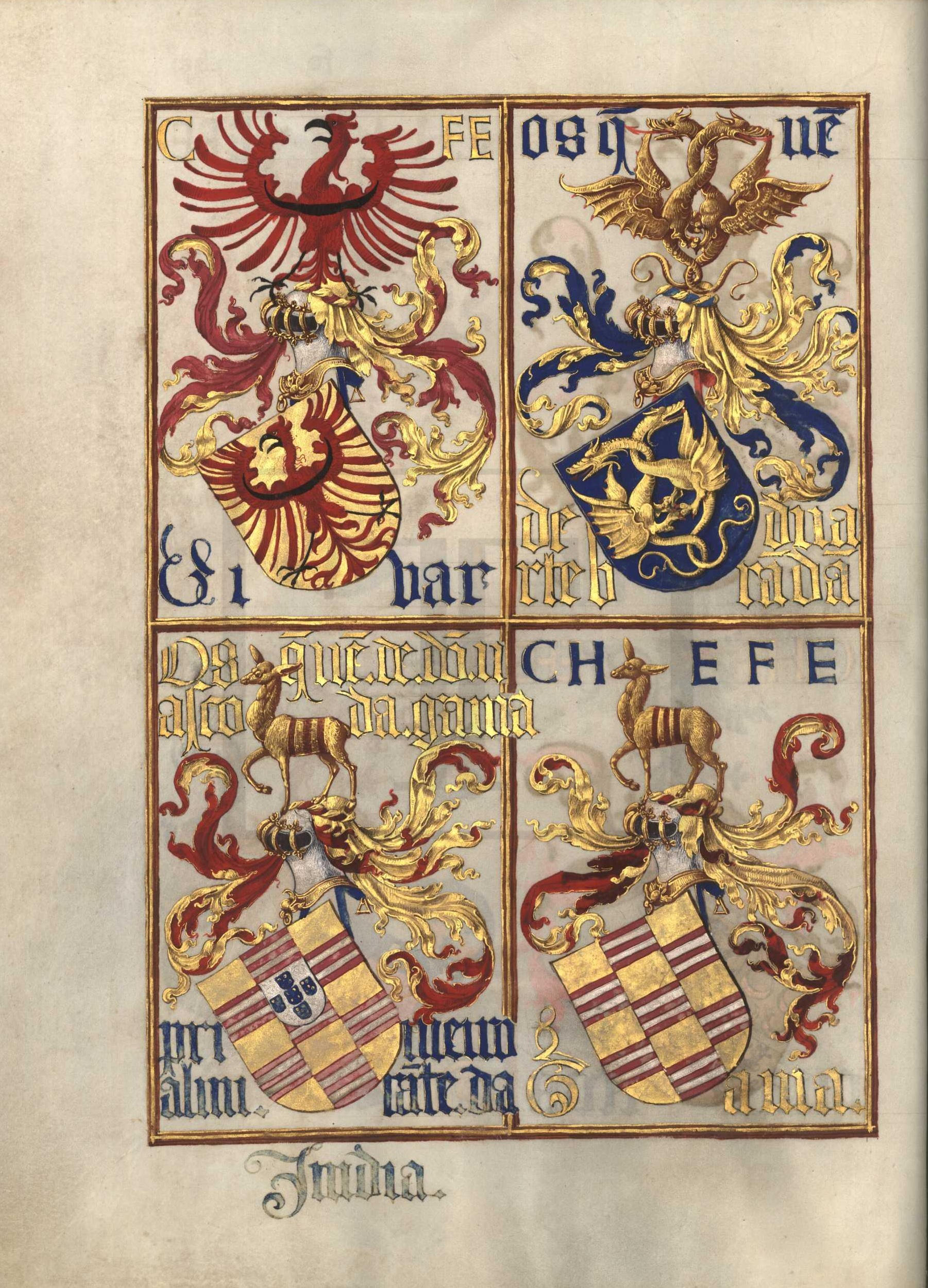 Livro da Nobreza e Perfeiçam das Armas (fl 18v)